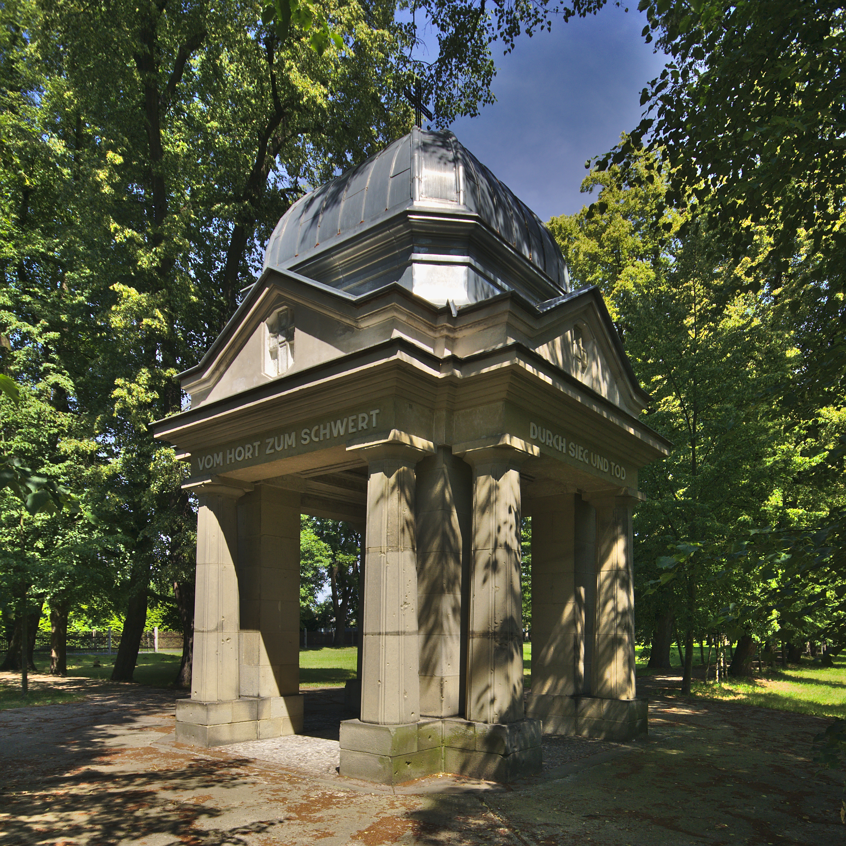 Vojenský hřbitov, Černovír, Olomouc